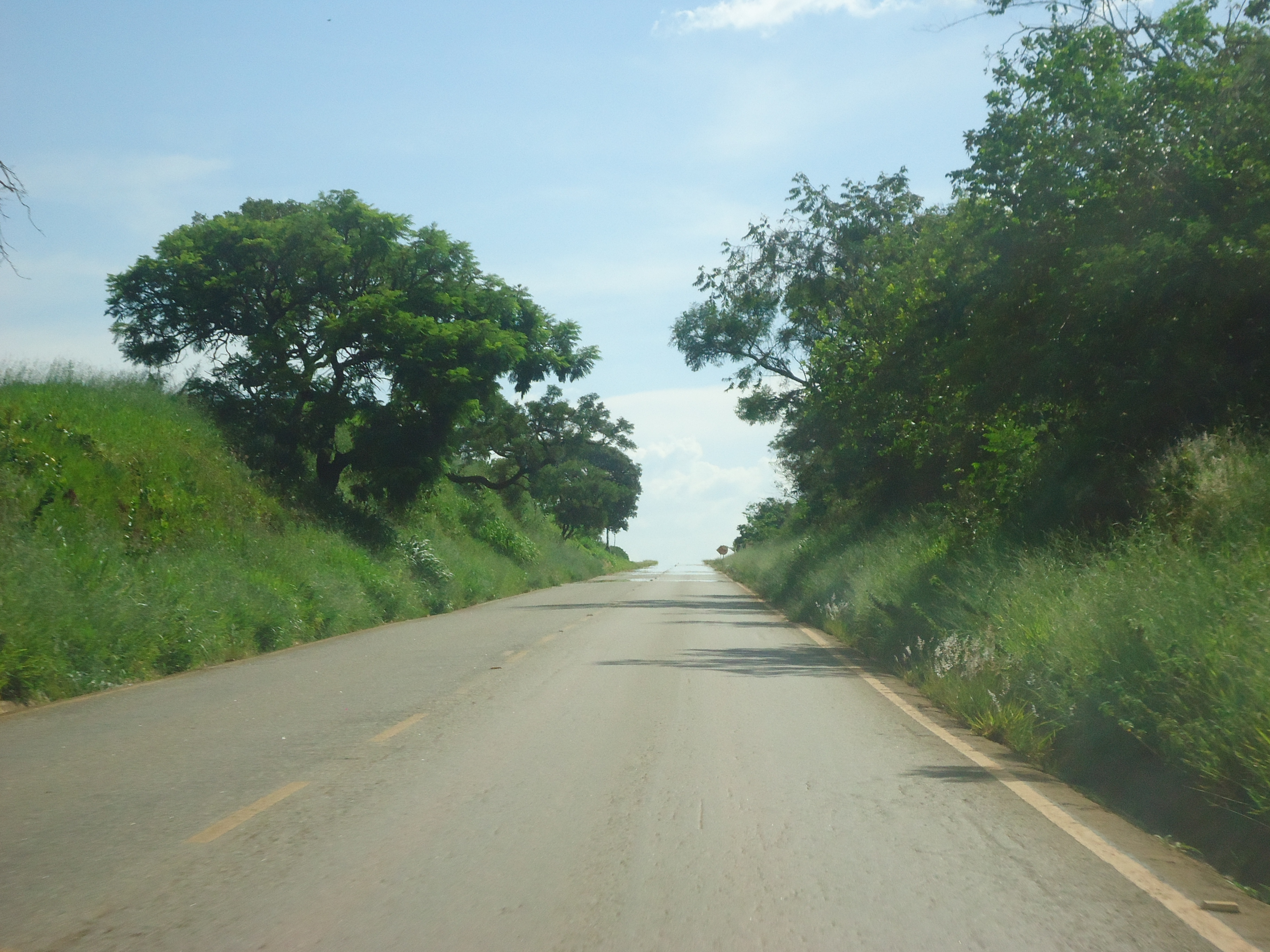 Vista da Rodovia BR-369 entre Boa Esperança e Campo Belo. Pode-se notar a miragem ao longe